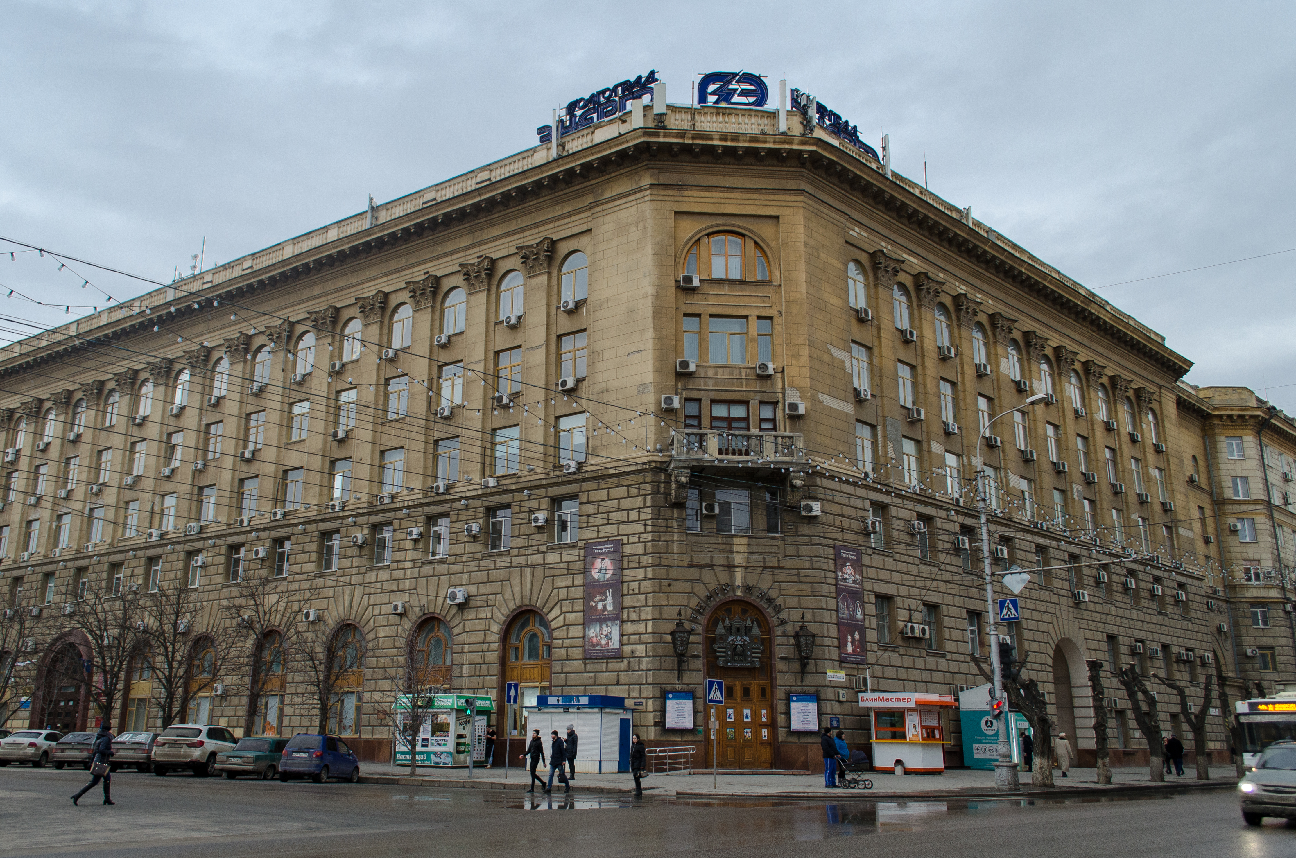 Здание Гидростроя и Театр кукол в феврале 2017 года